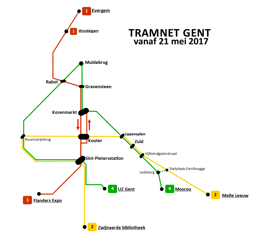 Tijdelijk tramplan van Gent gedurende de werken op de PAG-as en de Brusselsesteenweg van september 2011 tot 2017